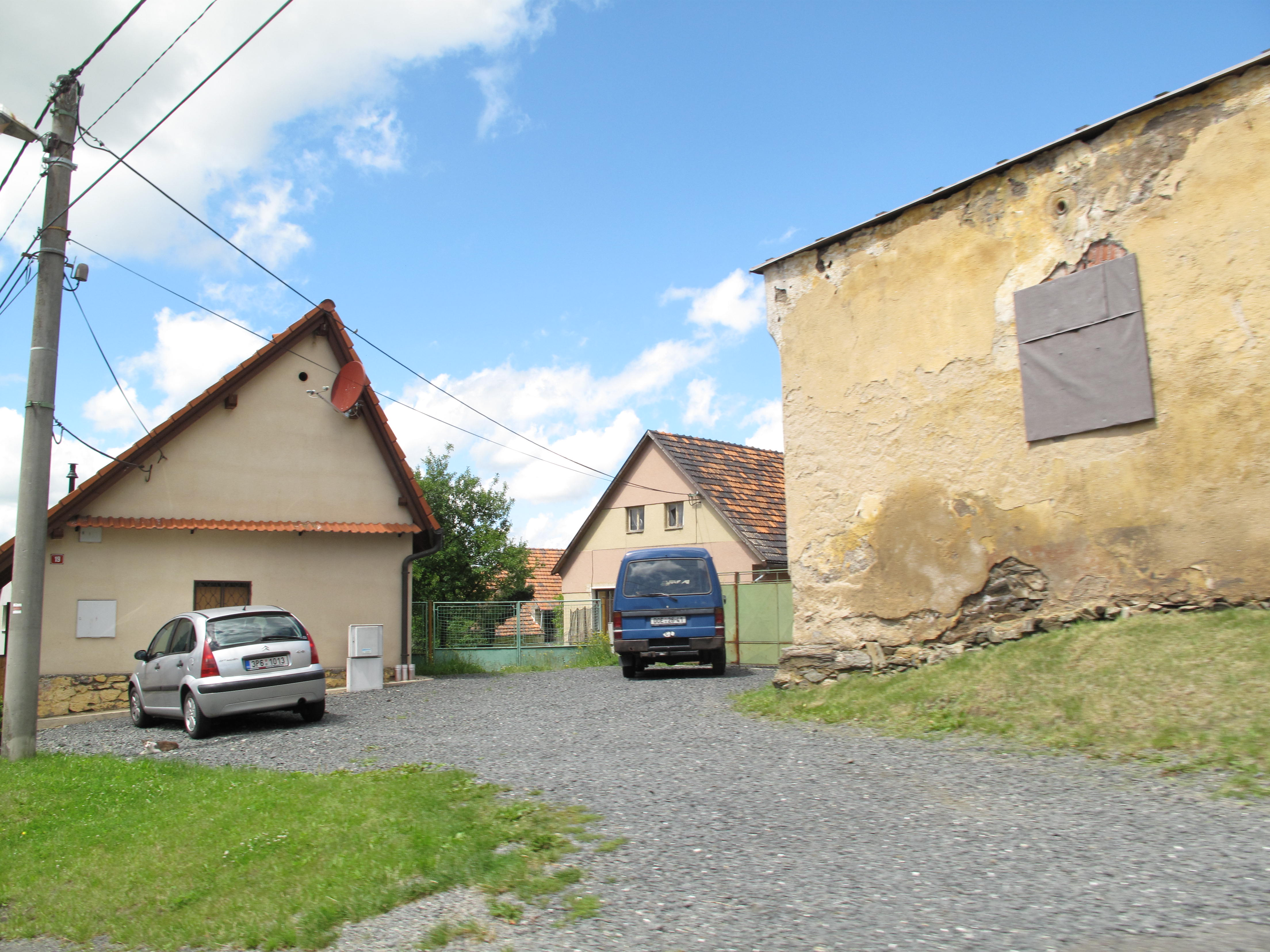 Bořice